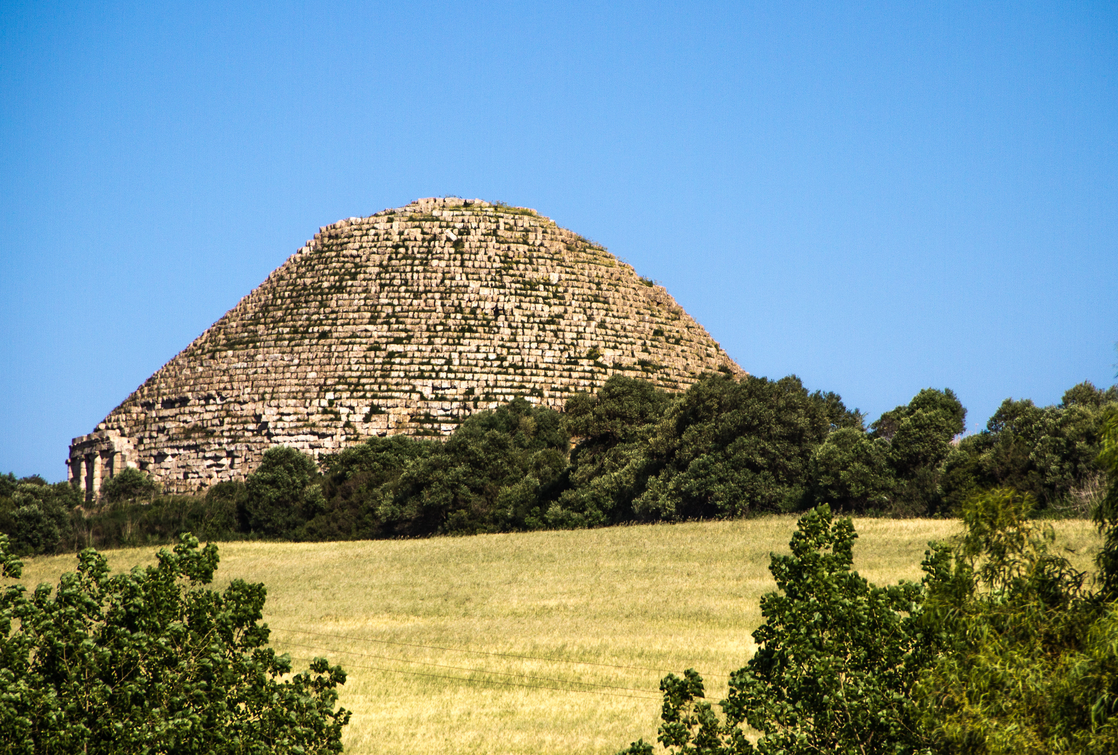 Le Mausolée royal de Maurétanie, surnommé Tombeau de la Chrétienne, en arabe Kbour-er-Roumia, est un monument de l'époque numide, situé en Algérie, sur l'actuelle commune de Sidi Rached, à une soixantaine de kilomètres à l'ouest d'Alger.